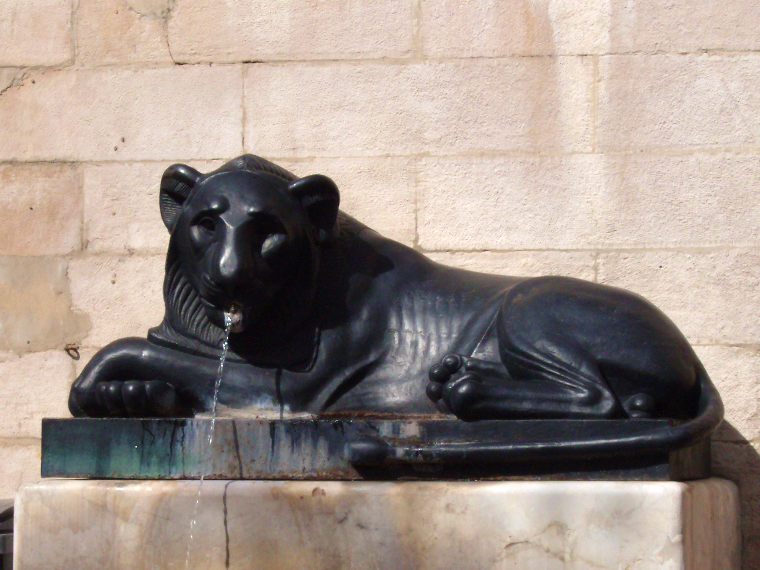 Cette fontaine représentant un lion se situe place Sathonay à Lyon